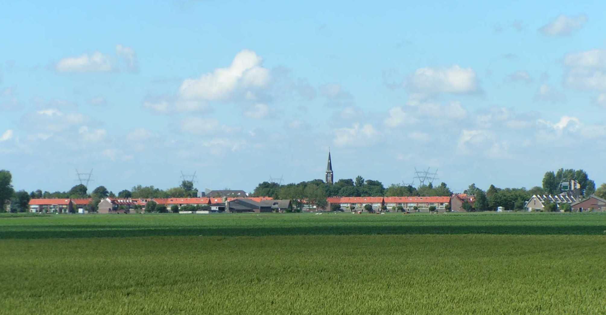 Hazerswoude-Dorp, gezien vanaf het zuiden.